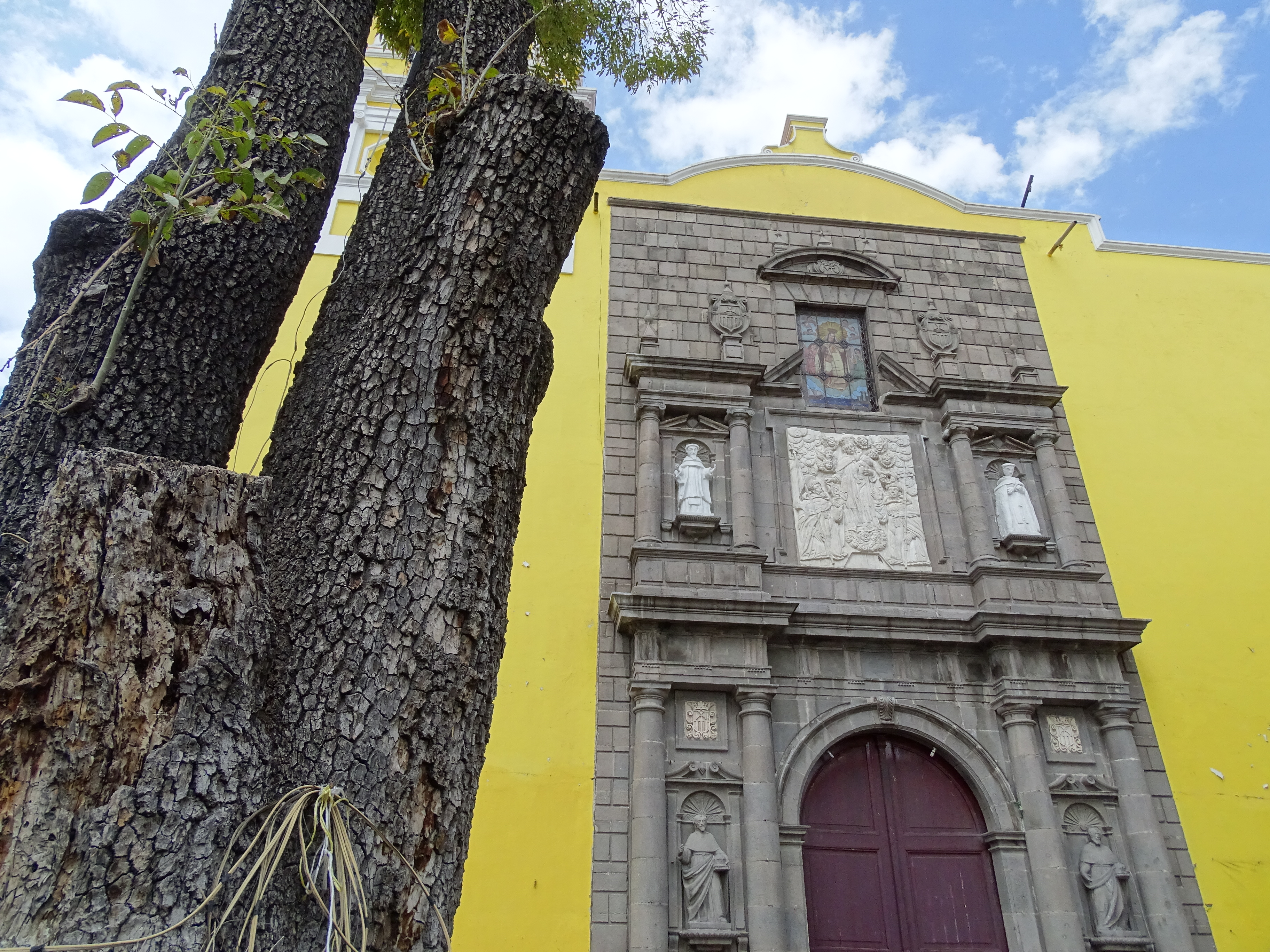 Facade of Templo Nuestra Senora de La Merced - Centro Historico - Puebla - Mexico - 01